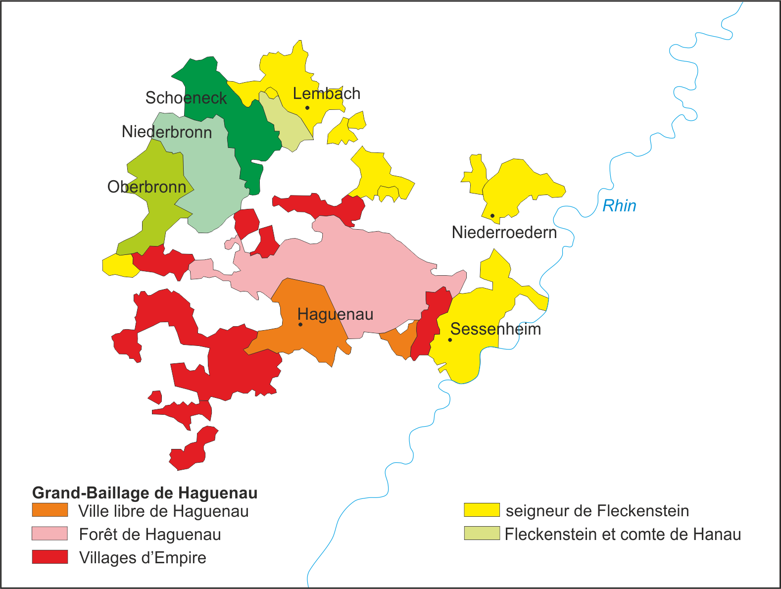 historische kaart deel Neder-Elzas